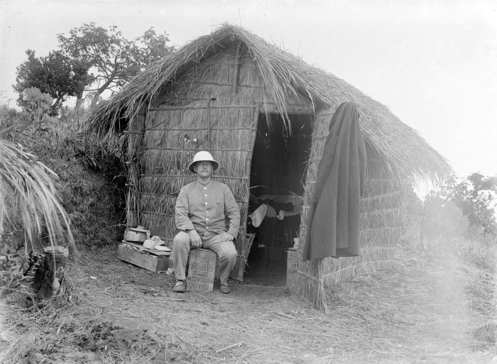 Negatief. Dr. Theophil Wurth voor een hut op de top van de vulkaan Merbabu